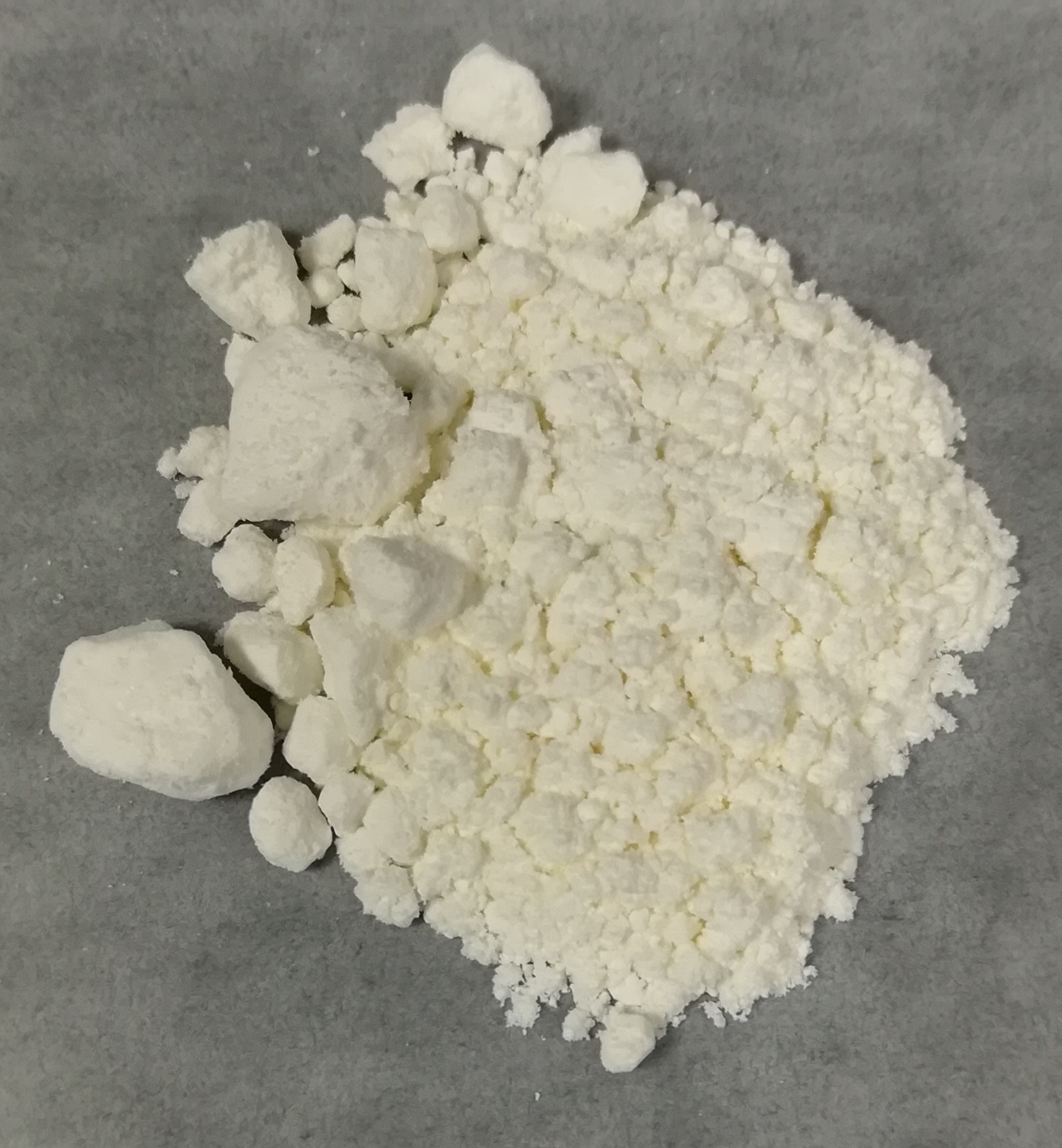 中文（中国大陆）: 吡啶-3,5-二羧酸（吡啶-3,5-二甲酸），98%.